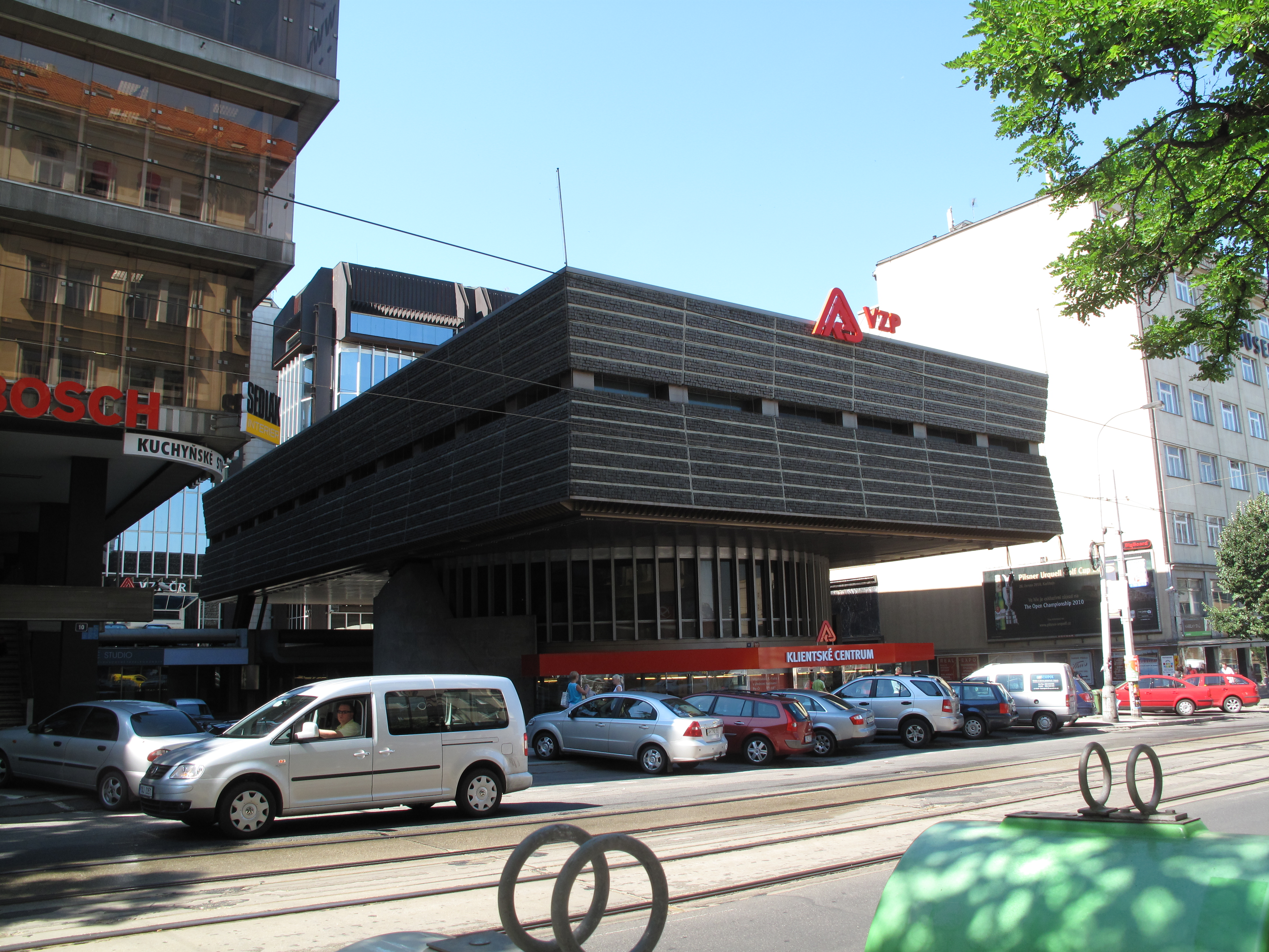 Budova VZP na Vinohradské, Praha-Vinohrady, Vinohradská 8.